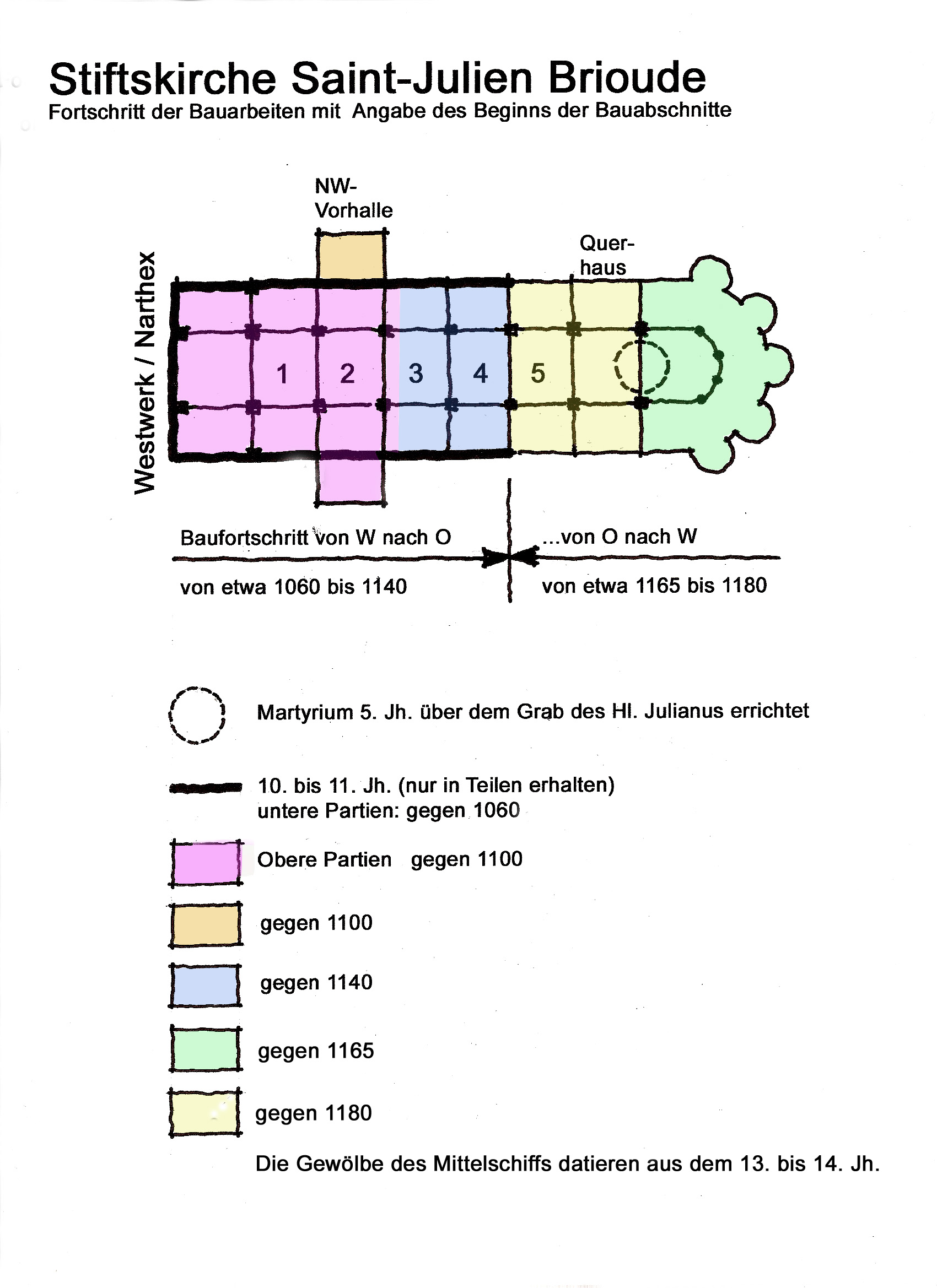 Saint-Julien Brioude, Baufortschritte, Handzkizze